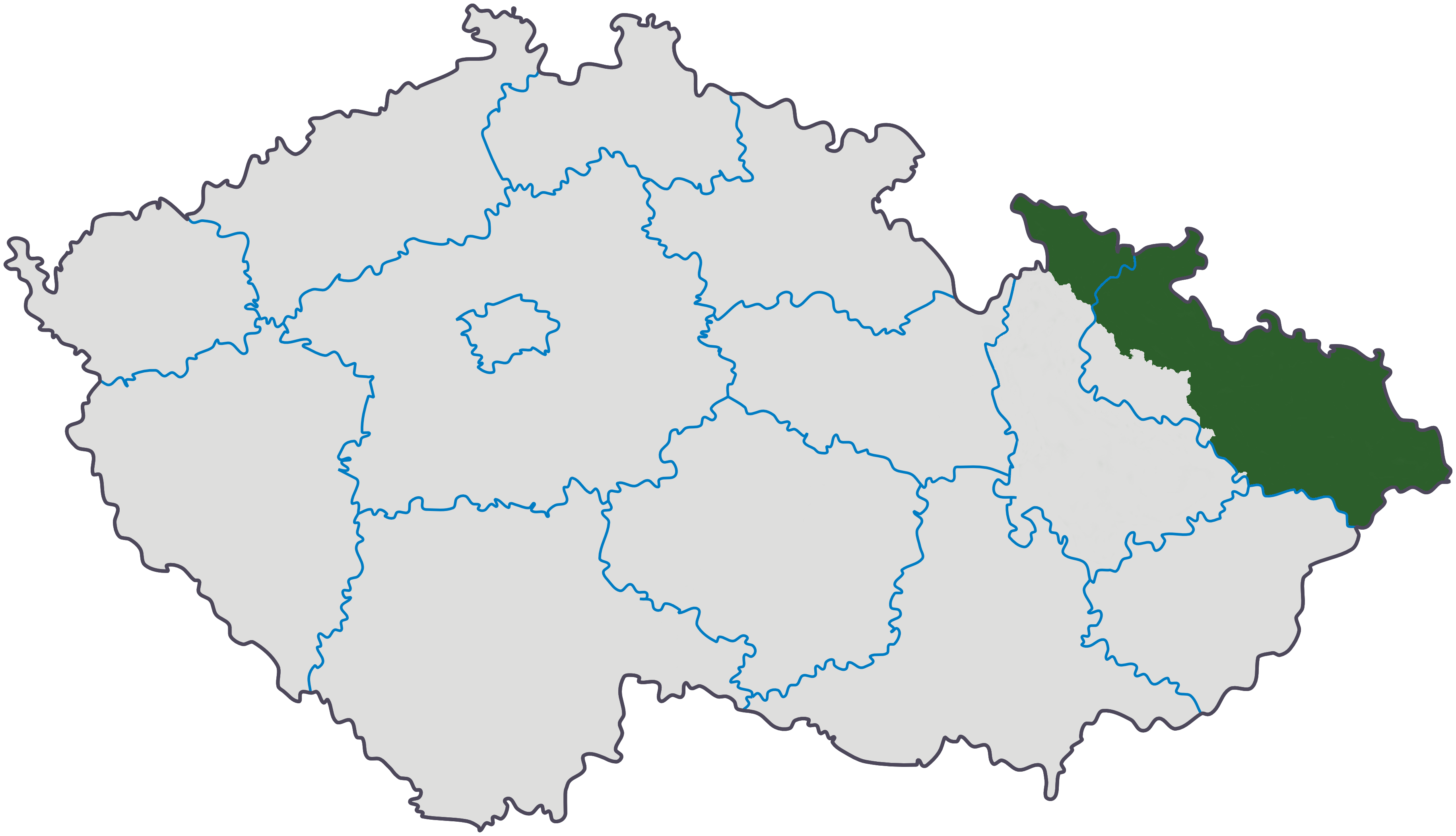 Někdejší Slezská expozitura země Moravskoslezské na mapě dnešního Česka